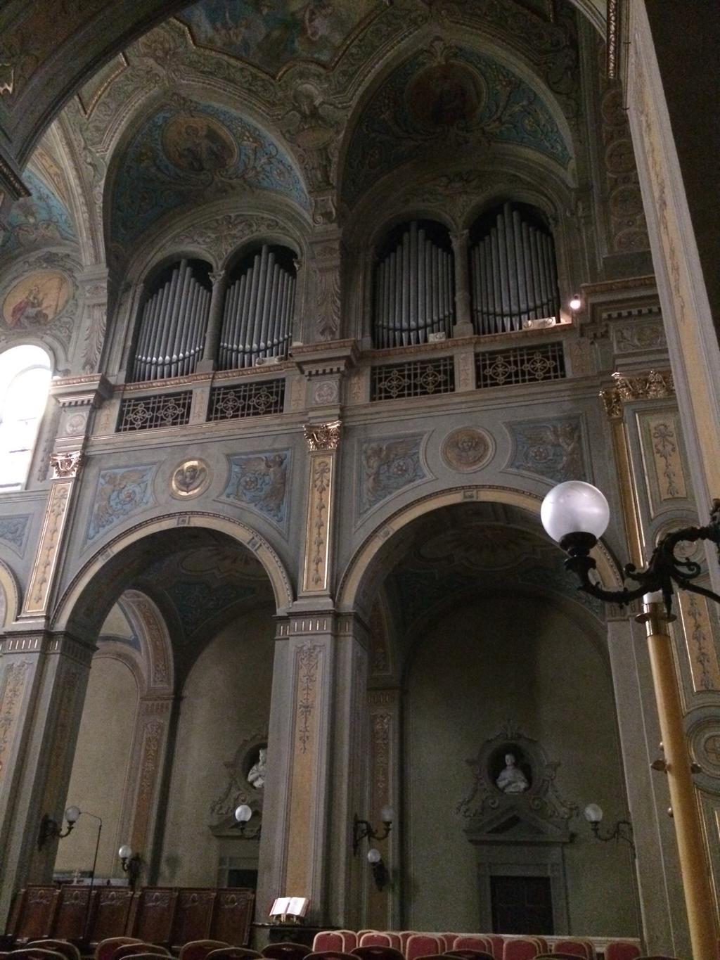 Parte del corpo fonico con le canne di facciata dell'Organo Balbiani posto nei matronei affacciati al presbiterio della cattedrale di Alessandria.